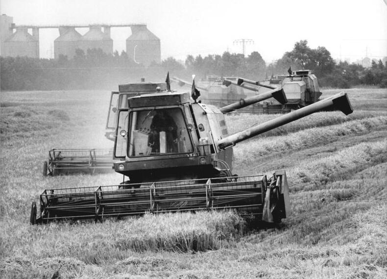 KAP Lichtenberg, Getreideernte "ADN-ZB Kohls 24.7.1976-Berlin-Sonnabend, 24.7.1976, 11.00 Uhr- bereits fünf Stunden ziehen die 15 Mähdrescher des Jugendobjekts ""zentrale Erntetechnik"" auf den Feldern der KAP Lichtenberg, Weißensee ihre Bahnen. 75 junge Leute - fast alle Studenten der Ingenieurschule für Landtechnik Friesack, sind seit dem 14.7. im Einsatz in der Berliner Landwirtschaft. Der Plan sieht vor, bis zum 10.8. die Getreideernte abzuschliessen, die Studenten, machen grosse Anstrengungen, den Termin zu unterbieten. R0724-31N 160 Hektar Gerste am Wochenende abzuernten ist ihr Ziel. Es wird mit mit ""fliegendem Schichtwechsel"" gearbeitet, damit die hochproduktiven Maschinen möglichst effektiv ausgelastet werden. Siehe aus R0724-34.35.36.37N."